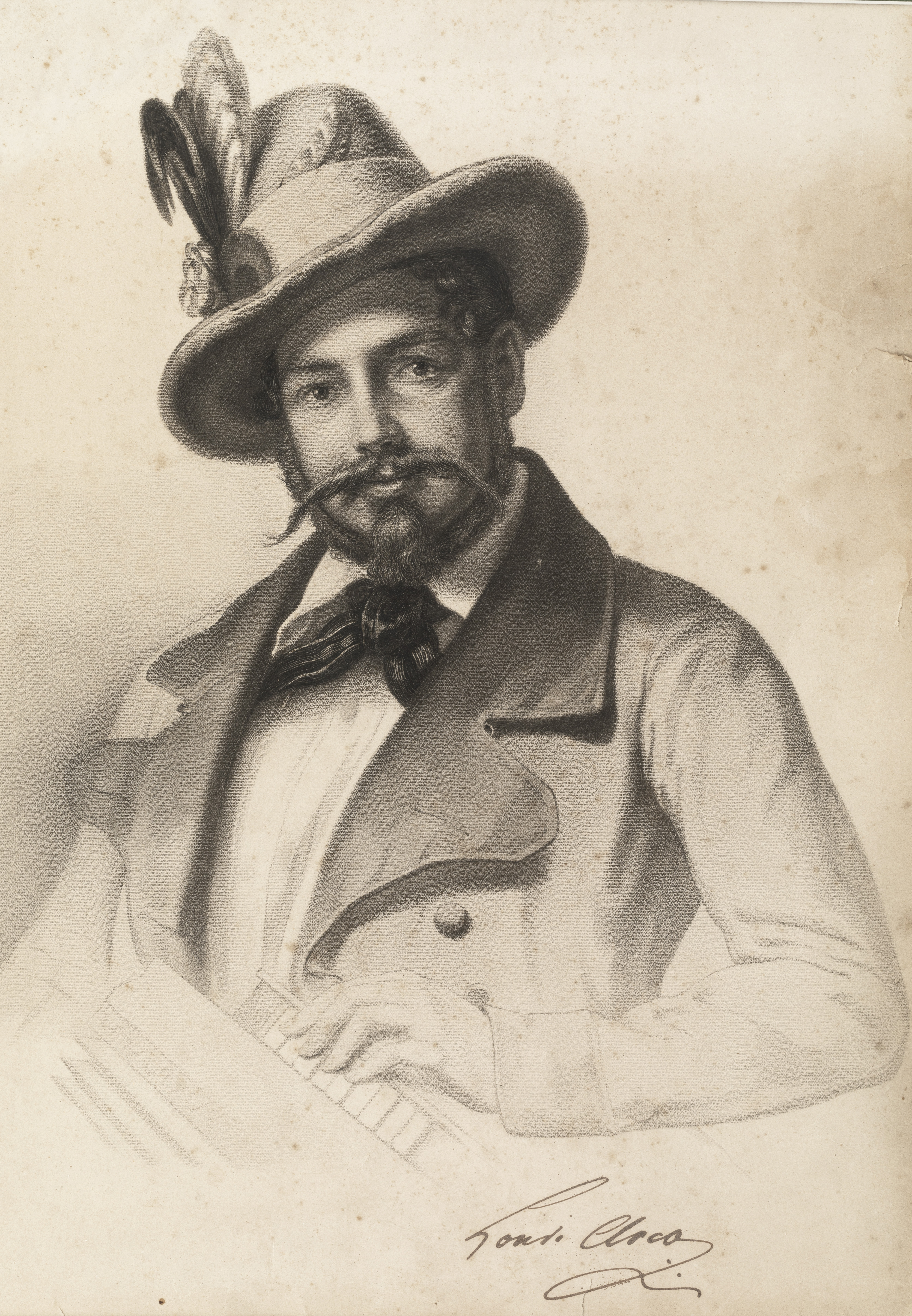 portrait